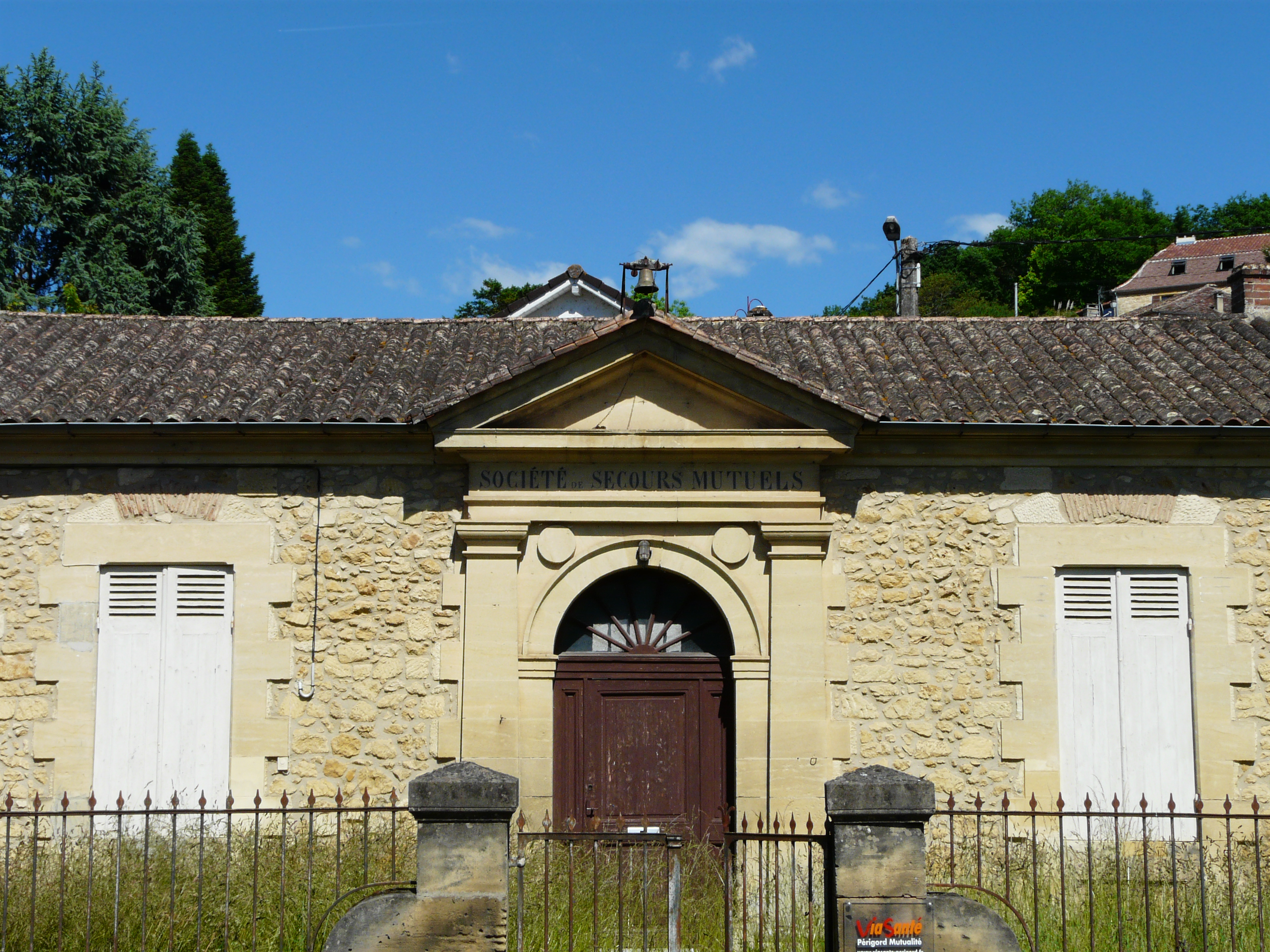 Bâtiment de la Société de secours mutuels dans le village de Couze-et-Saint-Front, Dordogne, France.